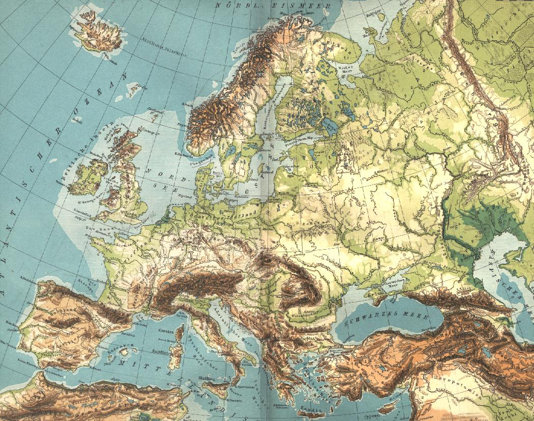 Carte géographique de l'Europe. Scan de Diercke Schul-Atlas für Höhere Lehranstalten de 1907 par Yann. Voir aussi Image:Europe geographique.jpg et Catégorie:Cartes d'Europe